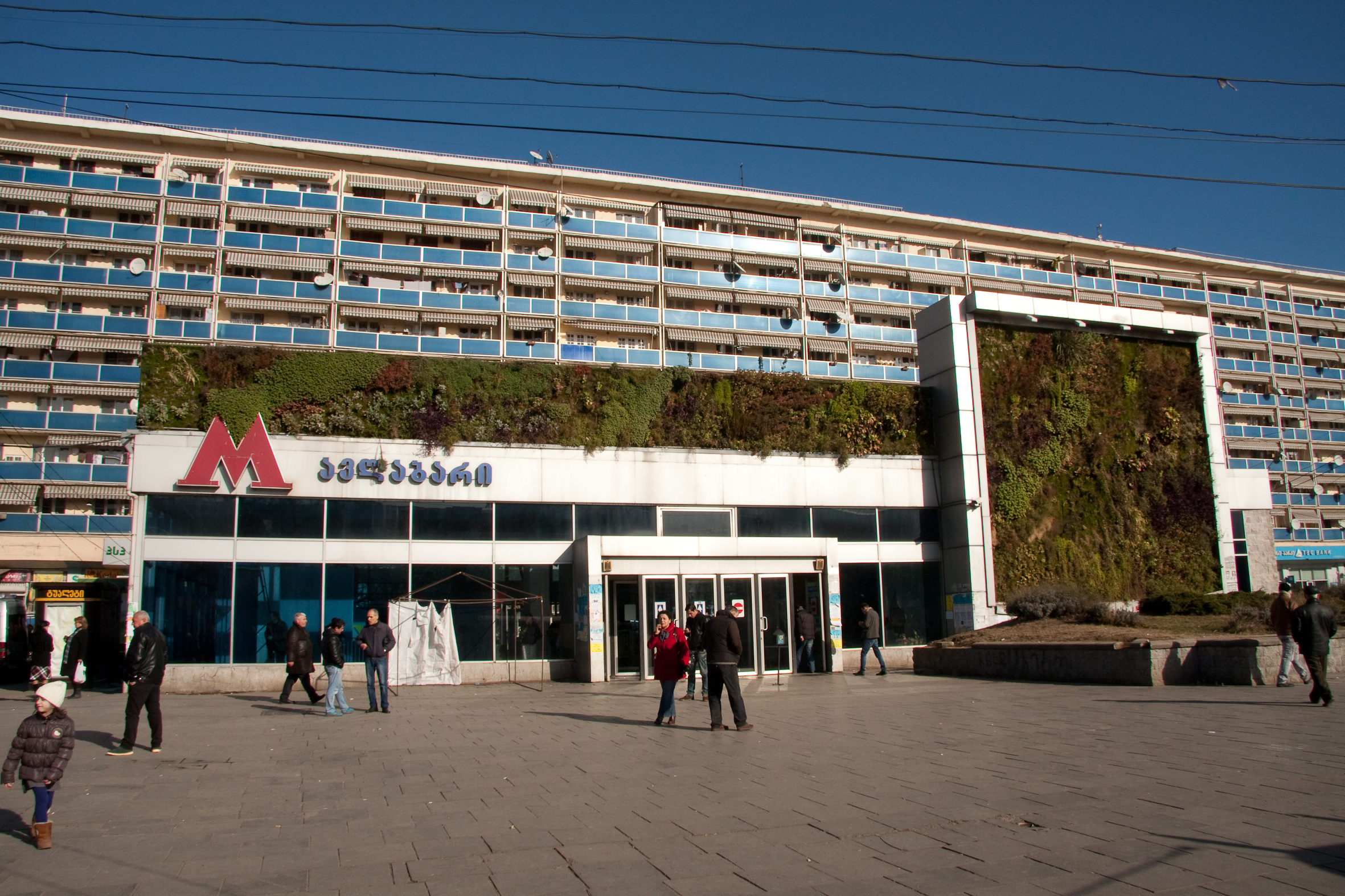 Stacja metra Avlabari w Tbilisi